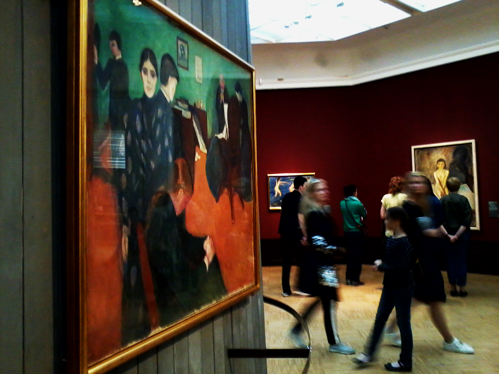 Выставка картин Эдварда Мунка в Москве, Третьяковская галерея (Инженерный корпус), 2019 год.